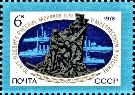 Почтовая марка СССР, выпущенная 20 сентября 1978 года, посвящённая 70-летию подвига русских моряков при спасении жителей Мессины во время землетрясения 28 декабря 1908 года. На марке изображён памятник в честь русских моряков работы скульптора Пьетро Кюфферле, воздвигнутый в Мессине (Италия), и корабли, которые участвовали в спасении жертв землетрясения: крейсеры «Богатырь» и «Адмирал Макаров», броненосцы «Слава» и «Цесаревич». Художник — Ю. Бронфенбренер. Номер по каталогу ЦФА — 4893. Тираж — 5,1 млн экземляров.